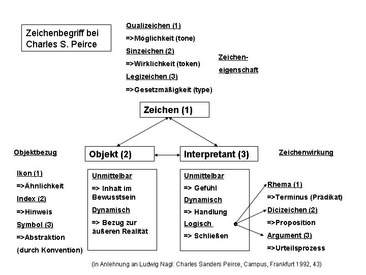 Übersicht zum Zeichenbegriff bei Charles S. Peirce